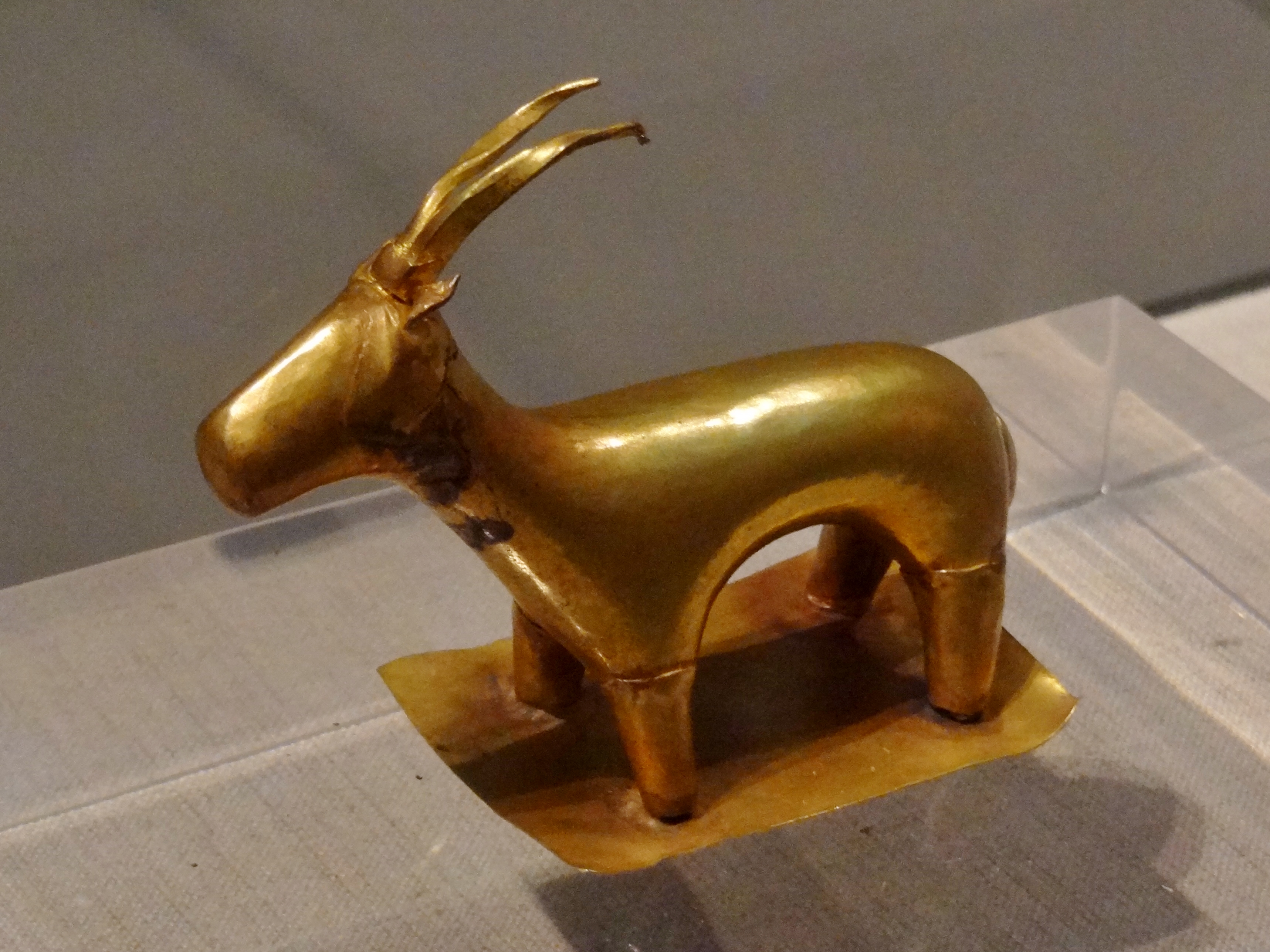 Goldenes Wildziegenidol (Agrimi-Idol; Länge 11 cm, Höhe 9 cm, Gewicht 180 g) im Prähistorischen Museum von Thira, gefunden in der Ausgrabungsstätte von Akrotiri auf Santorin (Thira), Kykladen, Griechenland